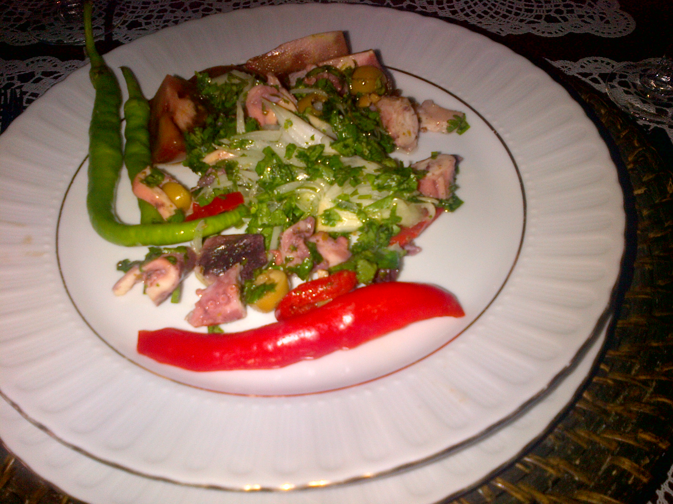 "Ahtapot salata" o "Ensalada de pulpo" de la cocina turca.